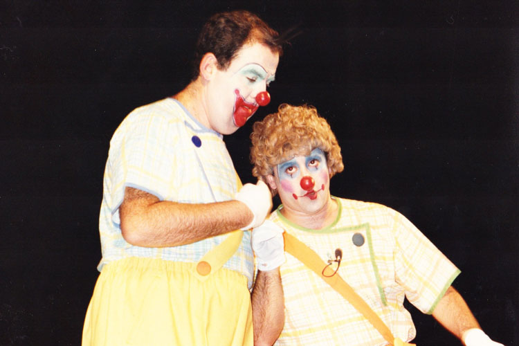 f